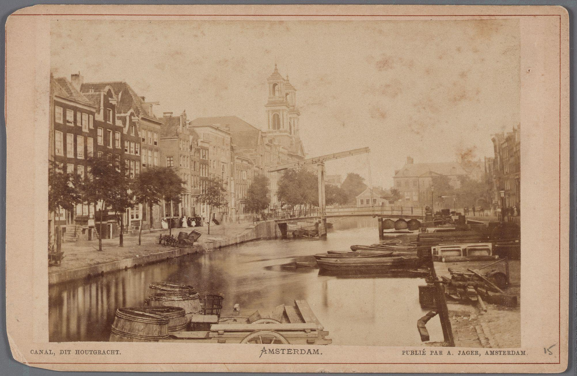 Beschrijving Houtgracht gezien naar de Mozes en AäronkerkIn het midden de brug tussen de Vlooienburgersteeg (later: Houtkopersdwarsstraat) en de Korte Houtstraat. Na demping in 1882 werd dit het Waterlooplein.Documenttype fotoVervaardiger Jager, A.Collectie Collectie Stadsarchief Amsterdam: kabinetfoto'sDatering 1867 t/m 1882Geografische naam WaterloopleinInventarissen 010005000536 Generated with Dememorixer